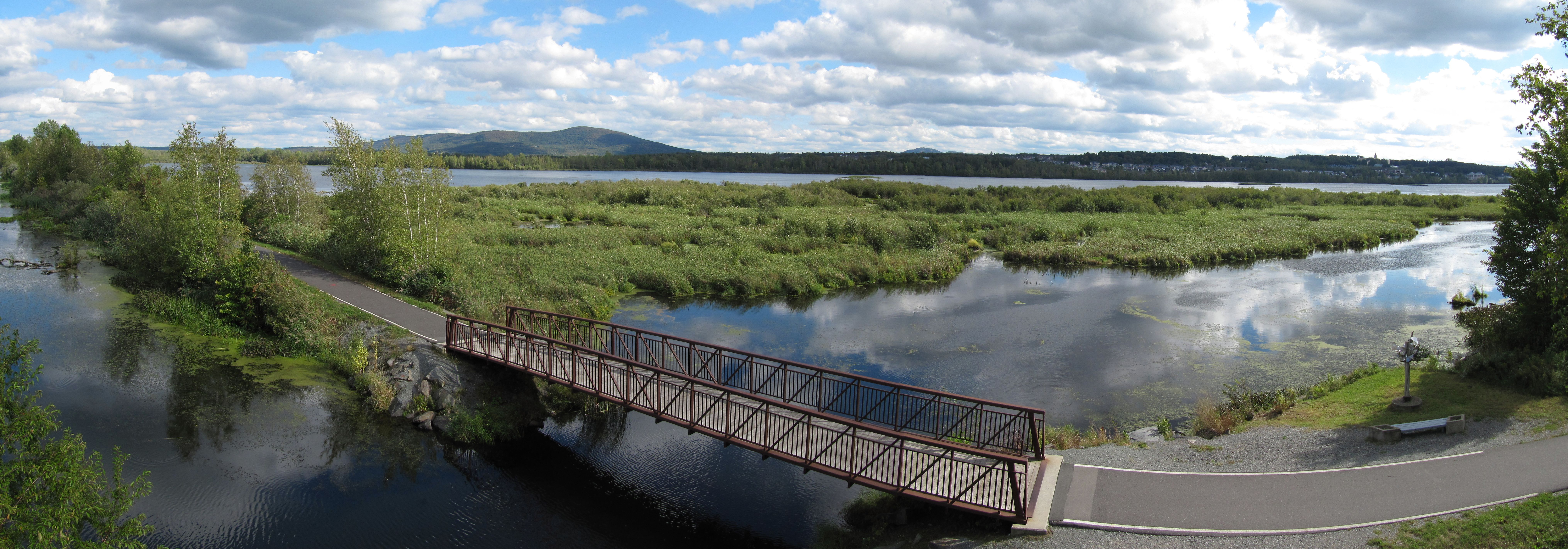 Panorama du lac Boivin depuis la "Tour d'y voir" du Centre d'Interprétation de la nature du lac Boivin de Granby (Québec)